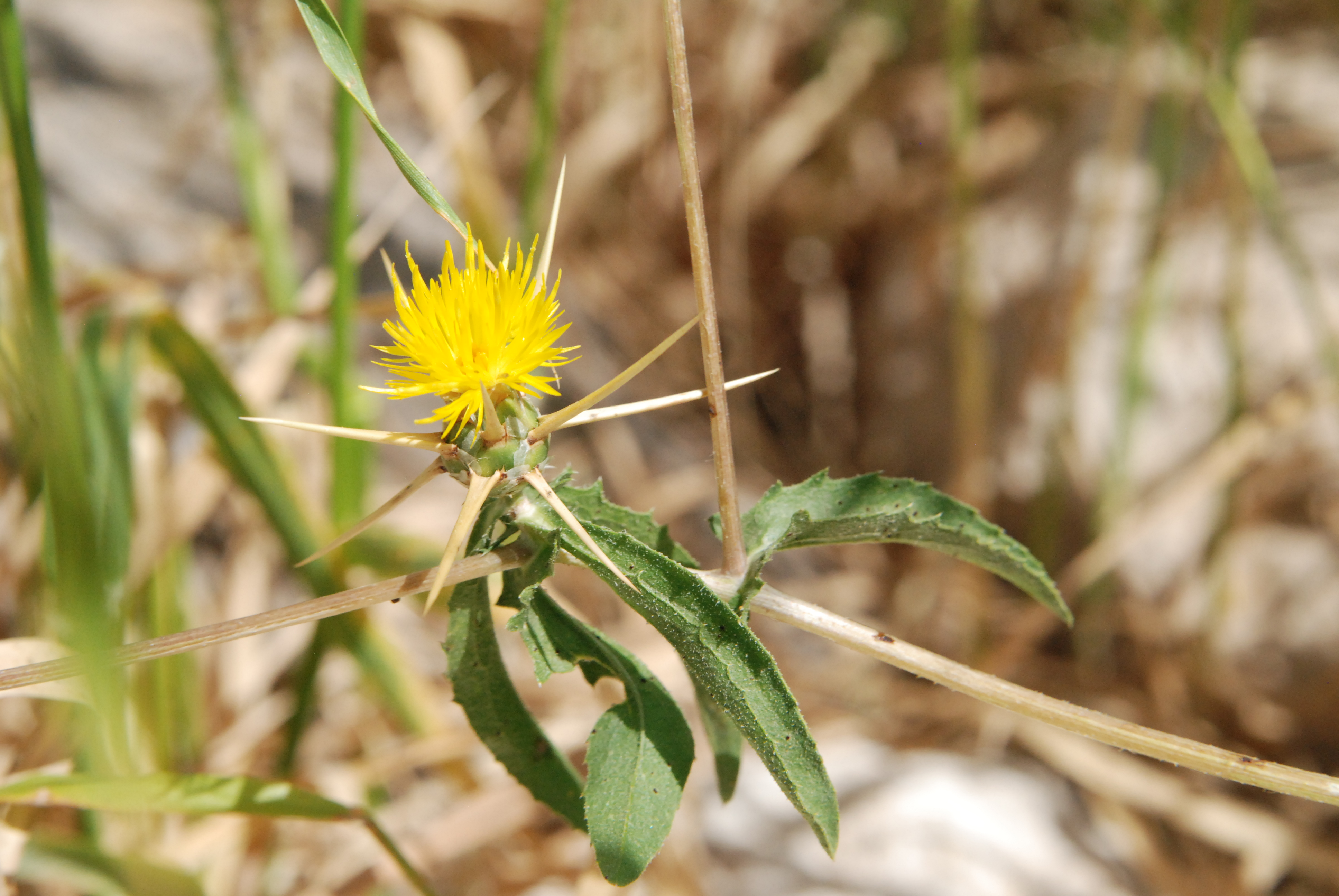 תמונה של דרדר קרומי, צולמה בתל שכה.